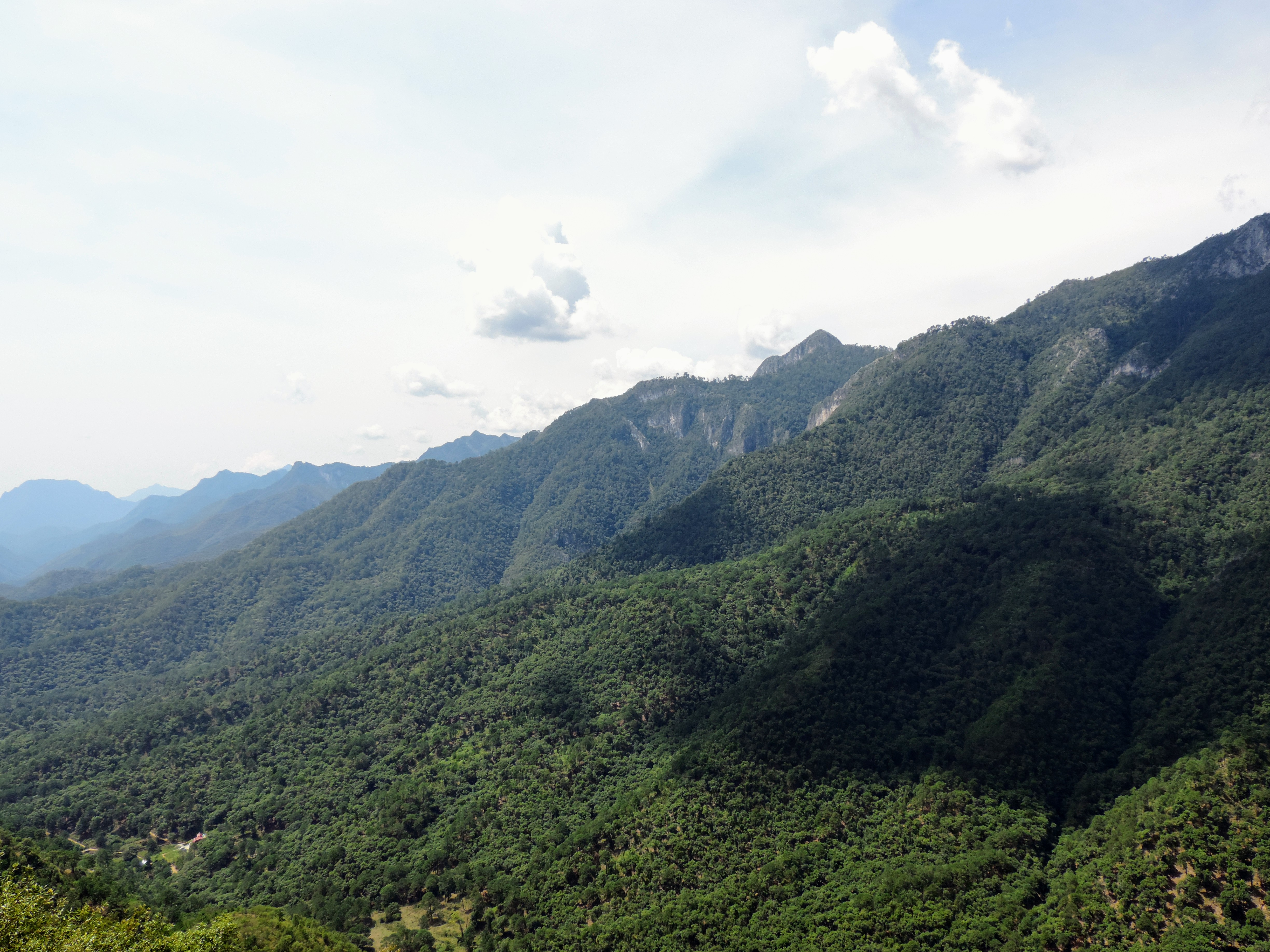 Sierra Mauricio, Santiago NL